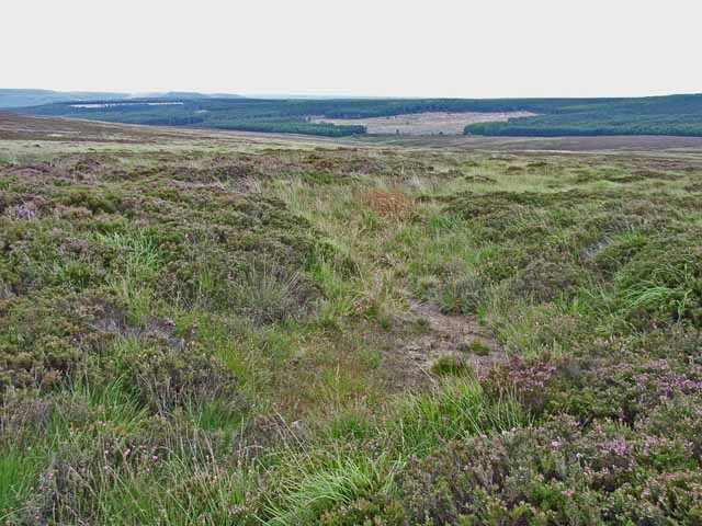 Fylingdales Moor